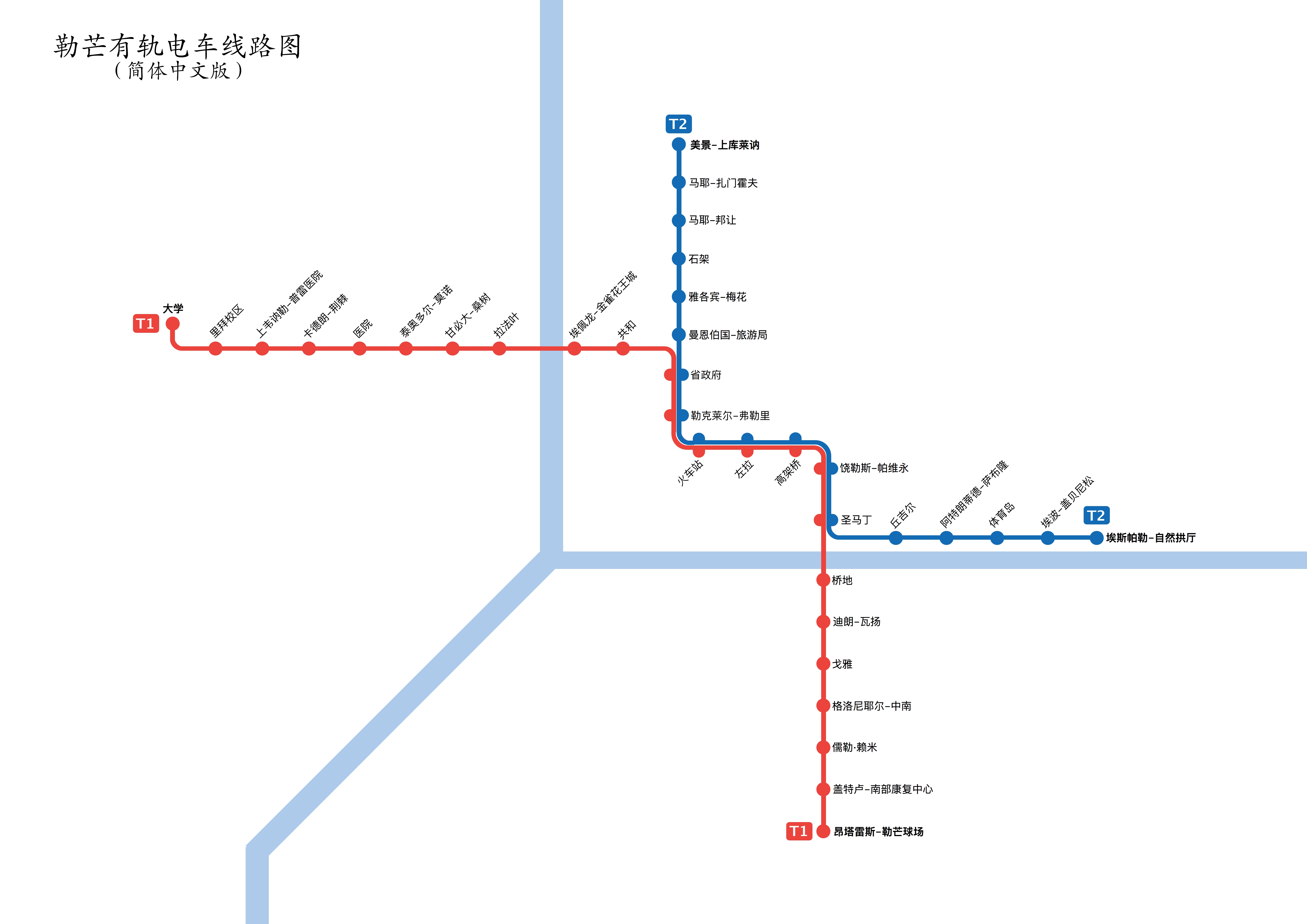 Plan du tramway du Mans en chinois